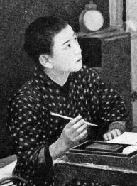 小川国松、1920年代の写真